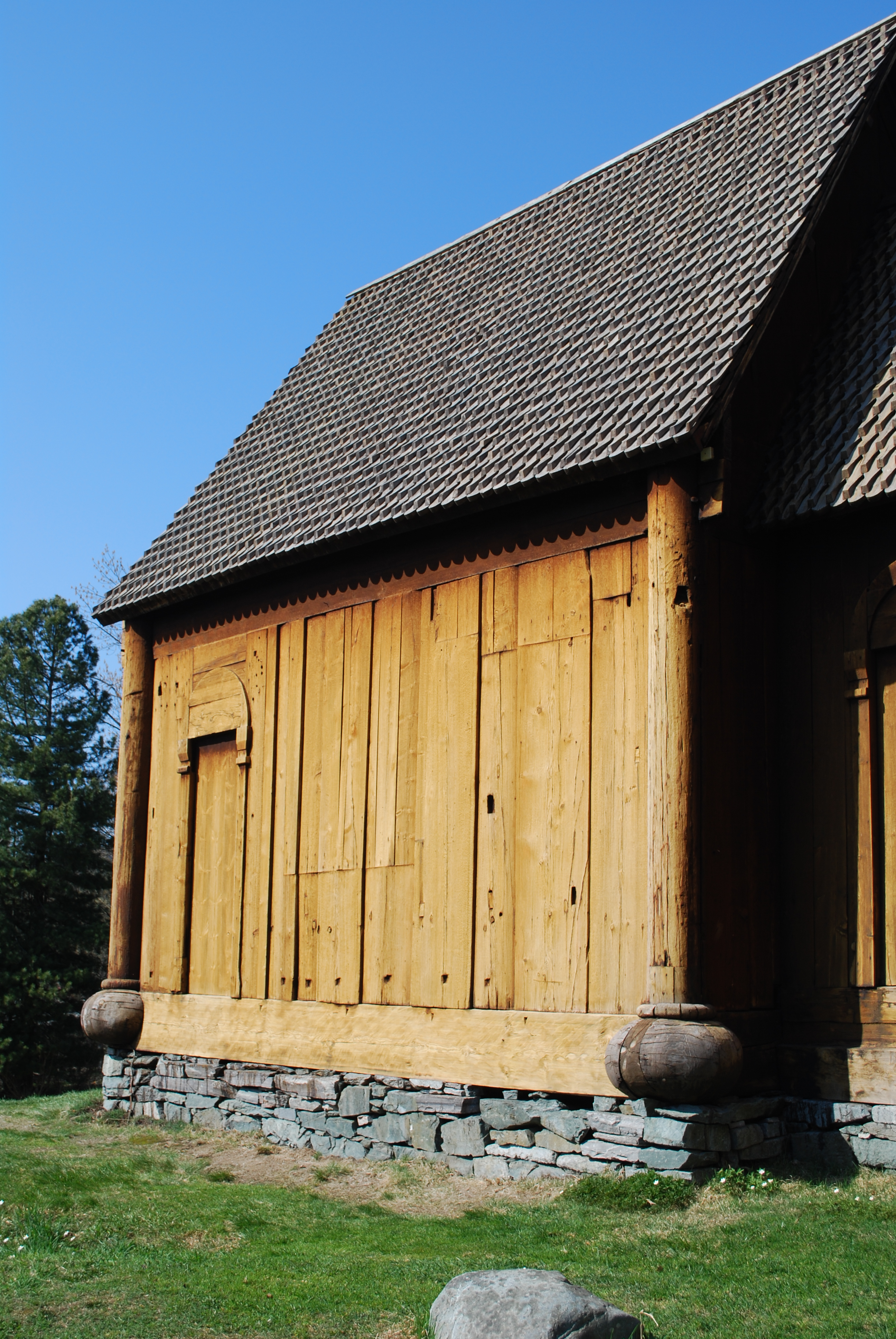 Haltdalen stavkirke, inngangsparti fra 17-1800-tallet som har blitt kledd igjen slik kirken opprinnelig så ut.